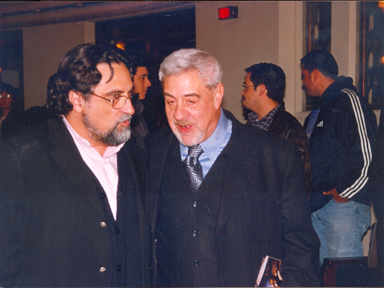 Silvio Caiozzi y Julio Jung; Pelicula Coronación ; año 2000